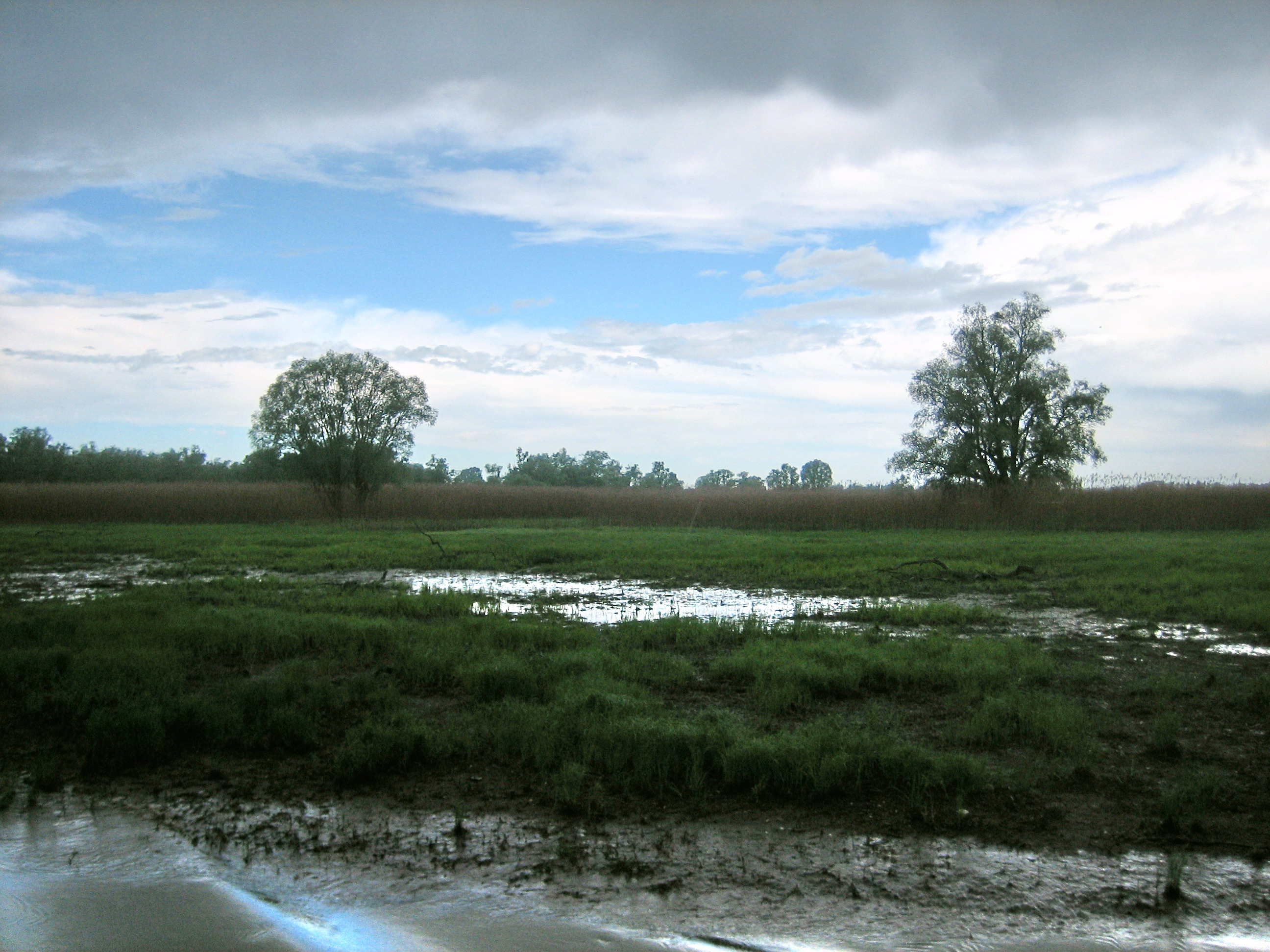 Kopački rit, a nature park in Baranja, eastern Croatia / Park prirode Kopački rit u Baranji.